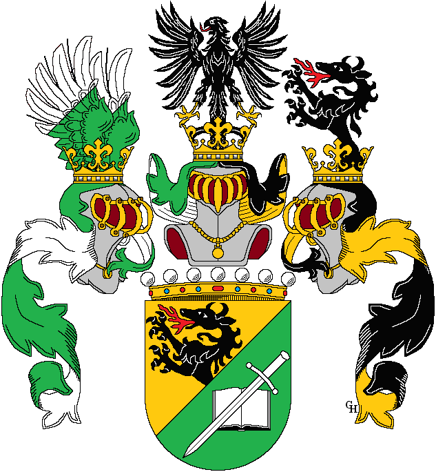 Wappen des österreichisch-ungarischen Feldmarschalleutnants Dr. Carl Freiherr von Bardolff (1865–1953), verliehen anlässlich seiner Erhebung in den österreichischen Freiherrenstand als Ritter des Militär-Maria-Theresien-Ordens 1918. Zeichnung von Gerd Hruška ( Für weitere Informationen zu dieser Standeserhebung siehe (